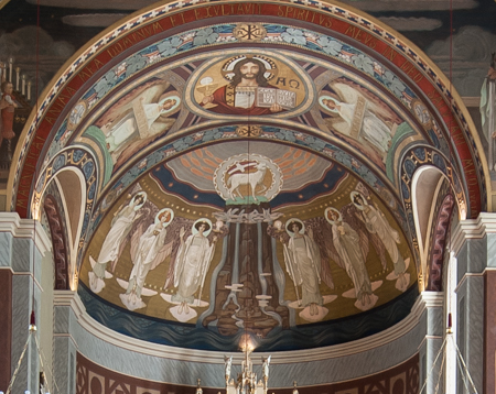 Wiki takes Nordtiroler Oberland: Apsiskalotte der Pfarrkirche Roppen, ausgemalt von Emanuel Raffeiner 1909/10